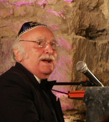 Leopold Kozłowski podczas Wieczoru Żydowskiego 4 lipca 2004 w dawnej synagodze w Pińczowie.